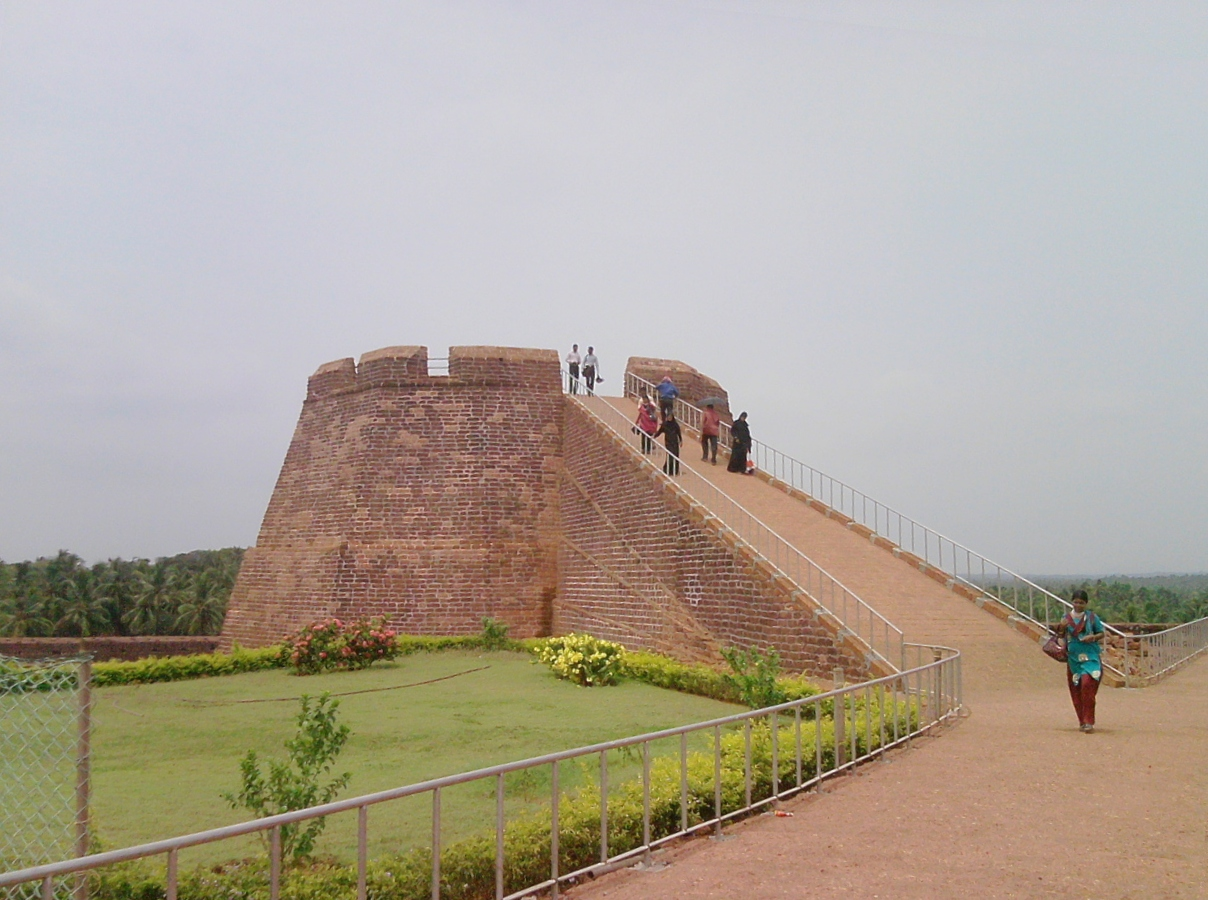 കോട്ടയുടെ അകത്തുനിന്നുള്ള കാഴ്ച. ചിത്രത്തിൽ കോട്ടയുടെ പുതുക്കിയ ഭാഗങ്ങൾ കാണാം